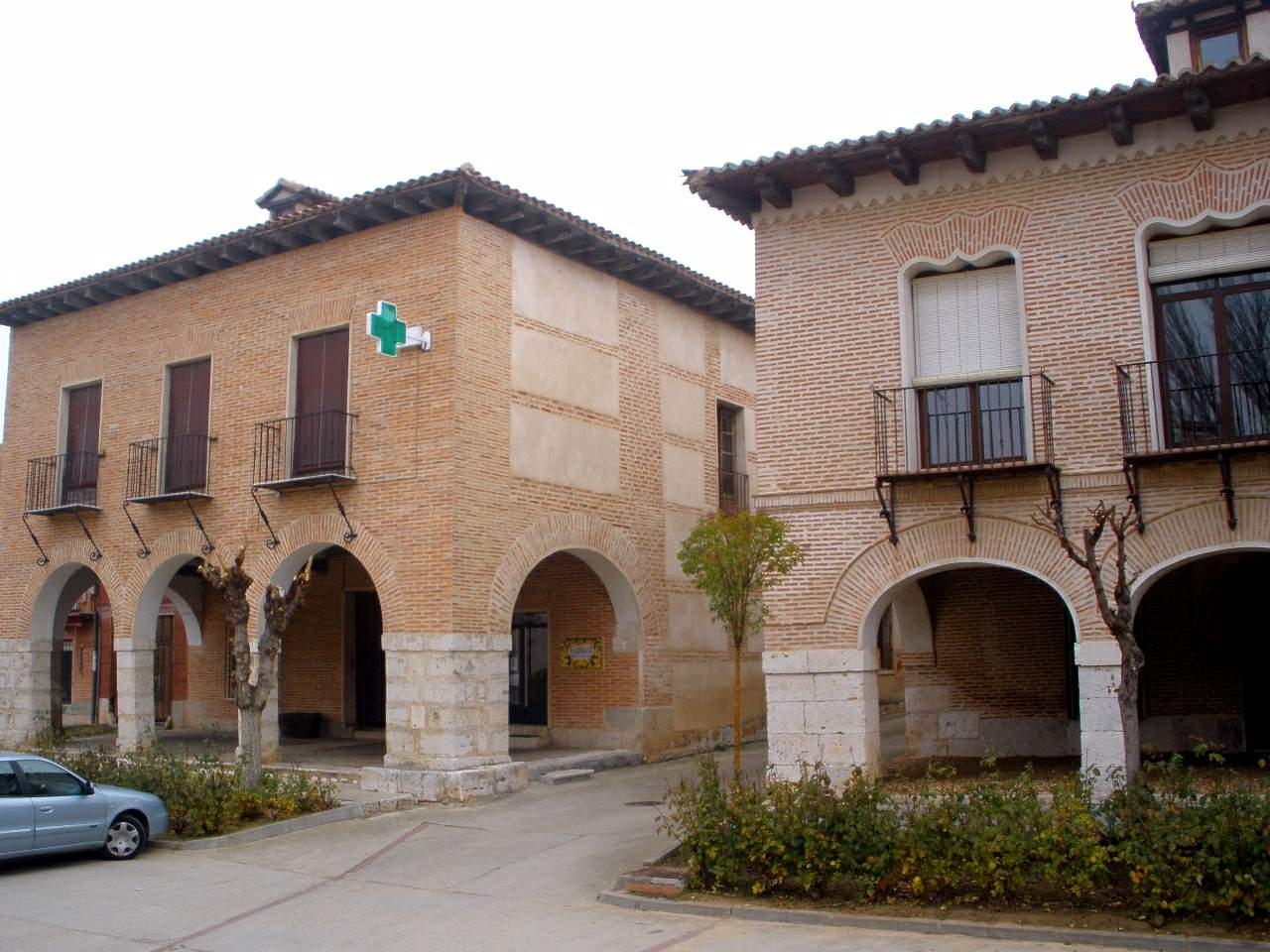 Rueda (Valladolid)